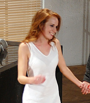 Táňa Pauhofová